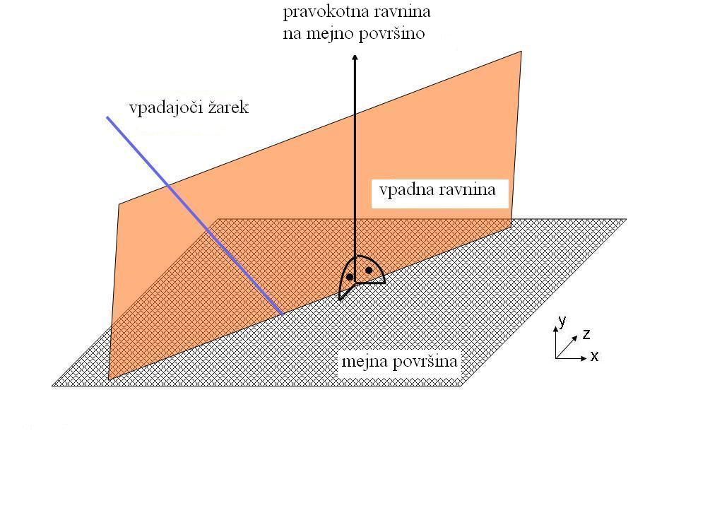 Določanje vpadne ravnine.